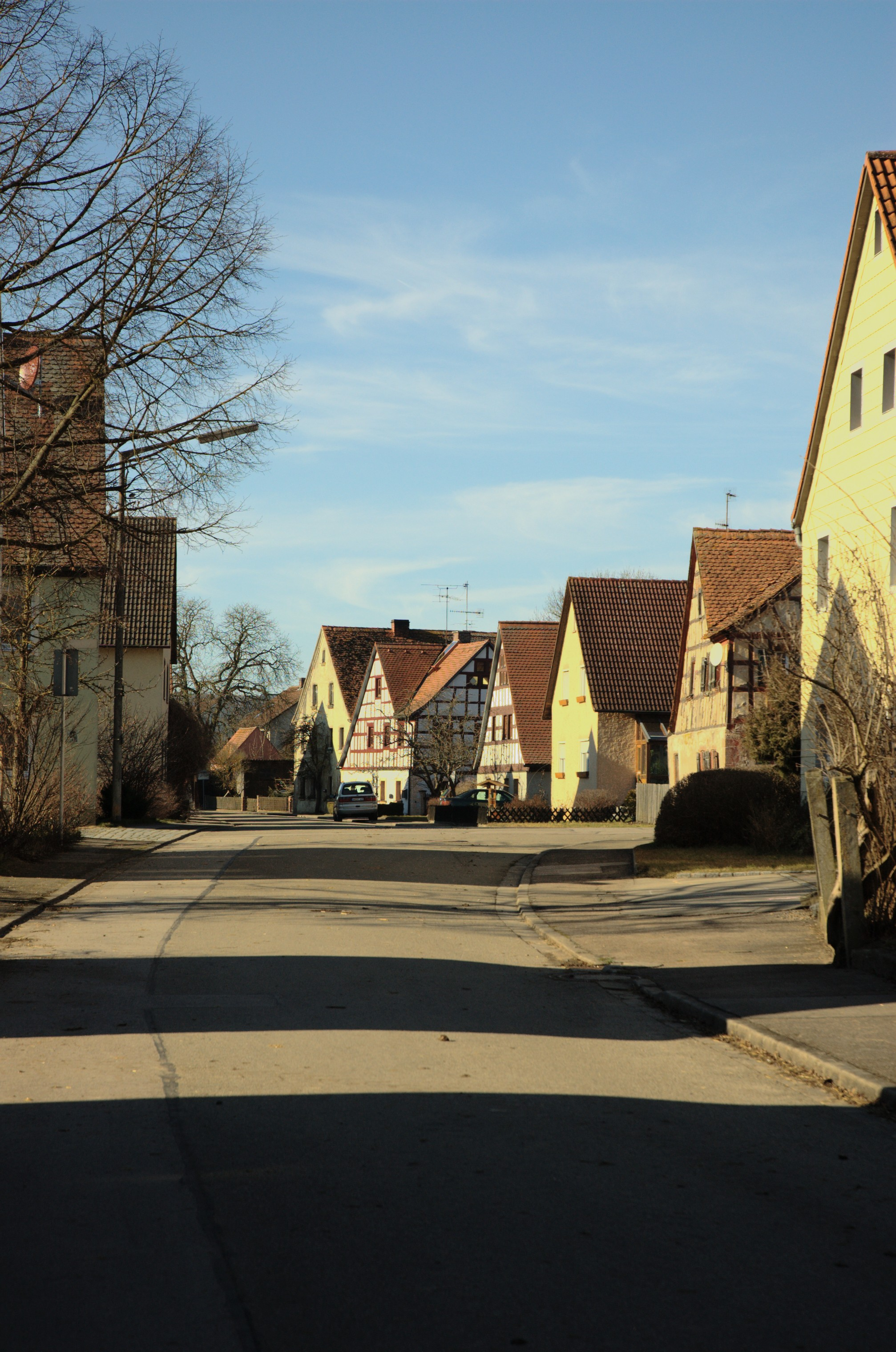 Zailach